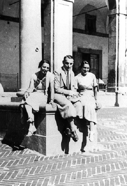 da sinistra, Anita Rho, Norberto Bobbio e Marisa Zini